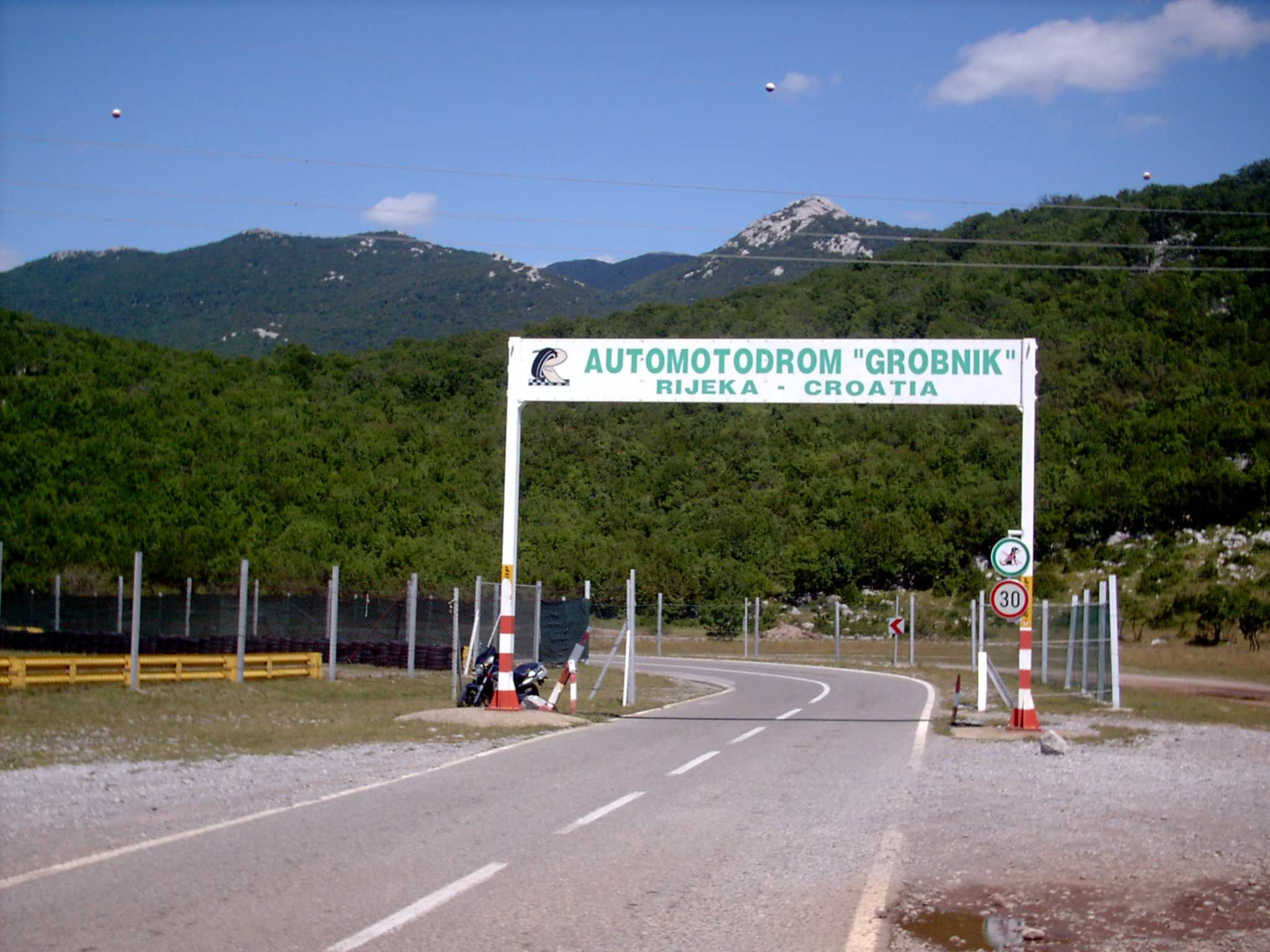 selbst fortografiert